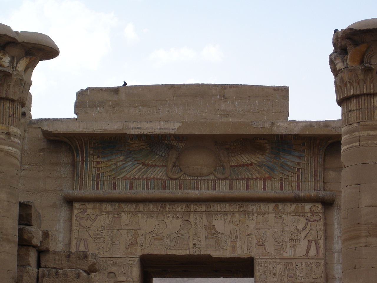 Théba, Medinet Habu